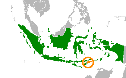 Lage von Indonesien und Osttimor